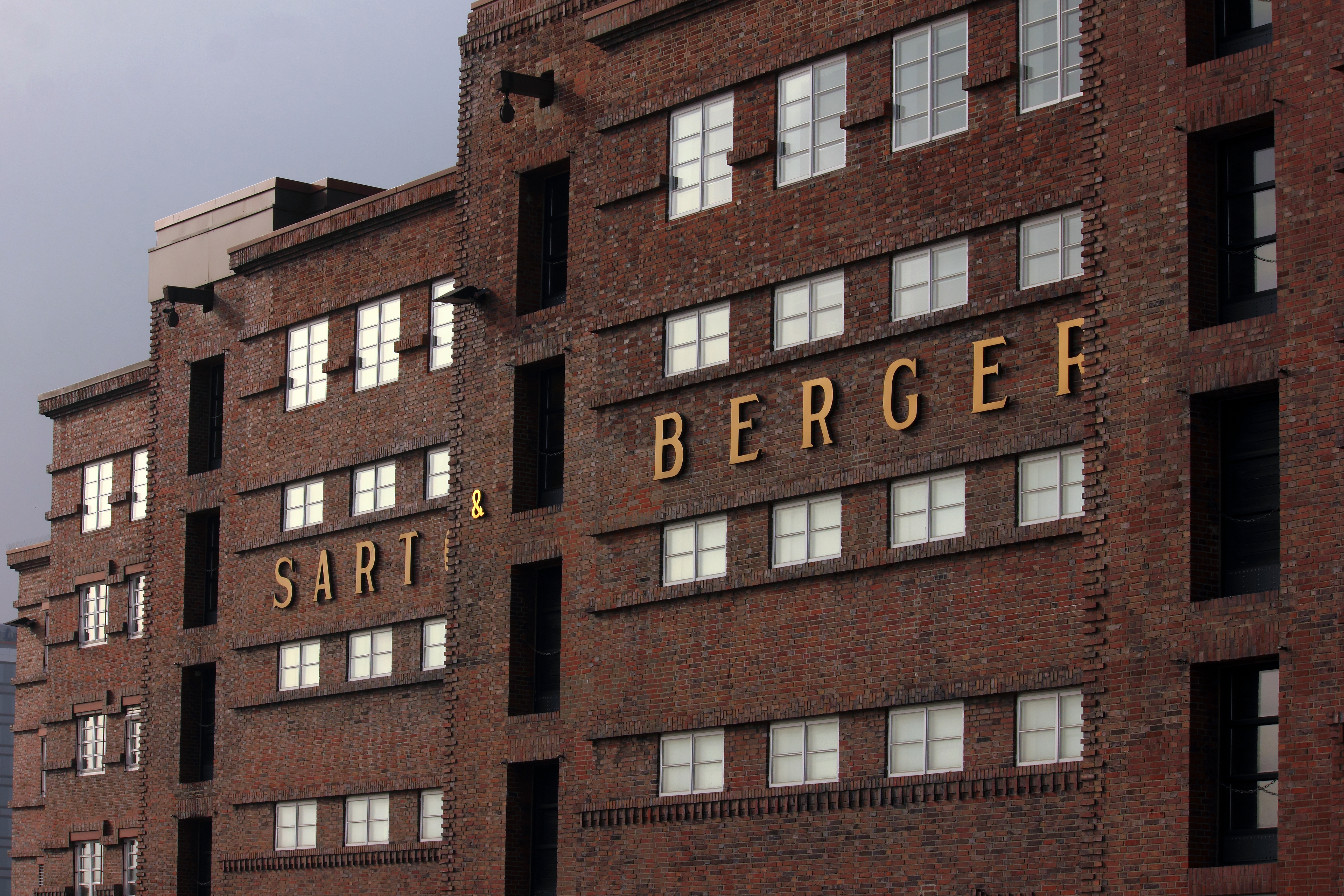 1925/26 von Architekt Ernst Stoffers errichteter Klinkerbau im Stil des Neuen Bauens in Kiel-Altstadt